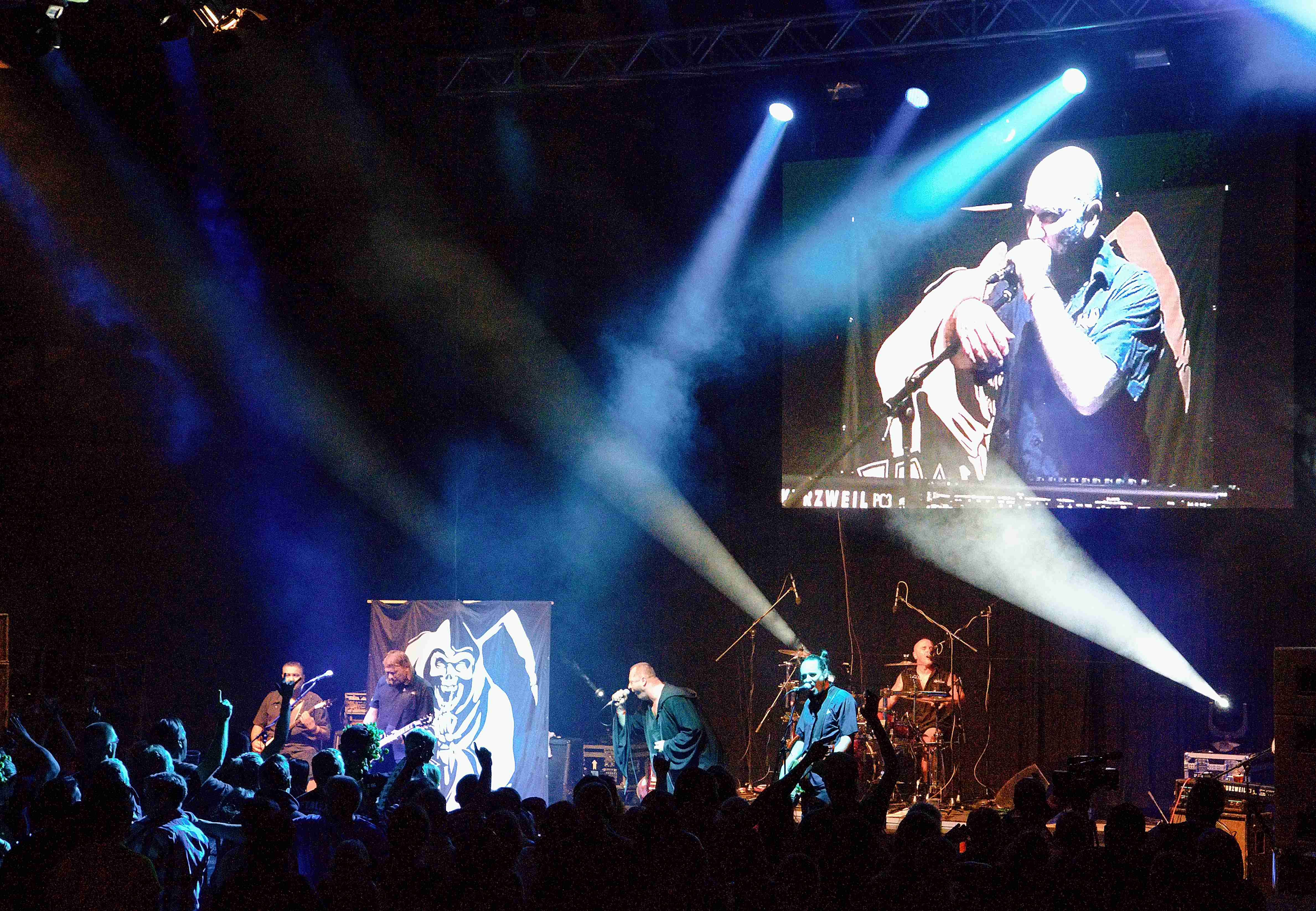 Skupina Komunál na vystoupení v letním kině v Žatci 2. září 2016